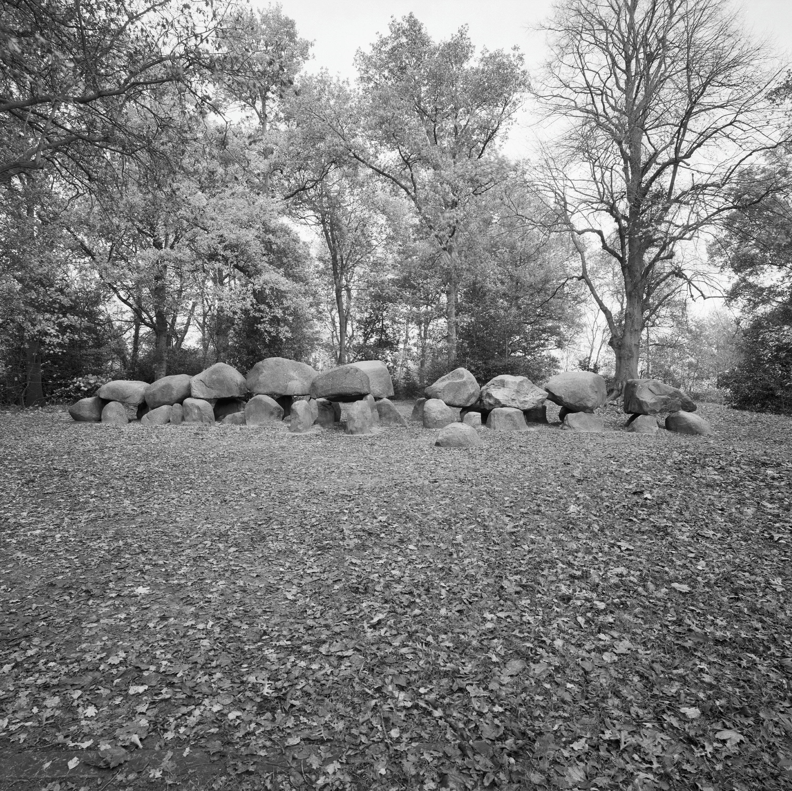 Hunebed D 27: Exterieur overzicht hunebed D 27 (opmerking: Monumenten In Nederland Drenthe, bladzijde 83)